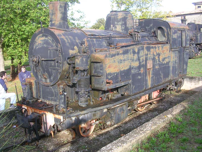 Locomotiva FCL.411 monumentata a Villa Garavelle (Città di Castello)